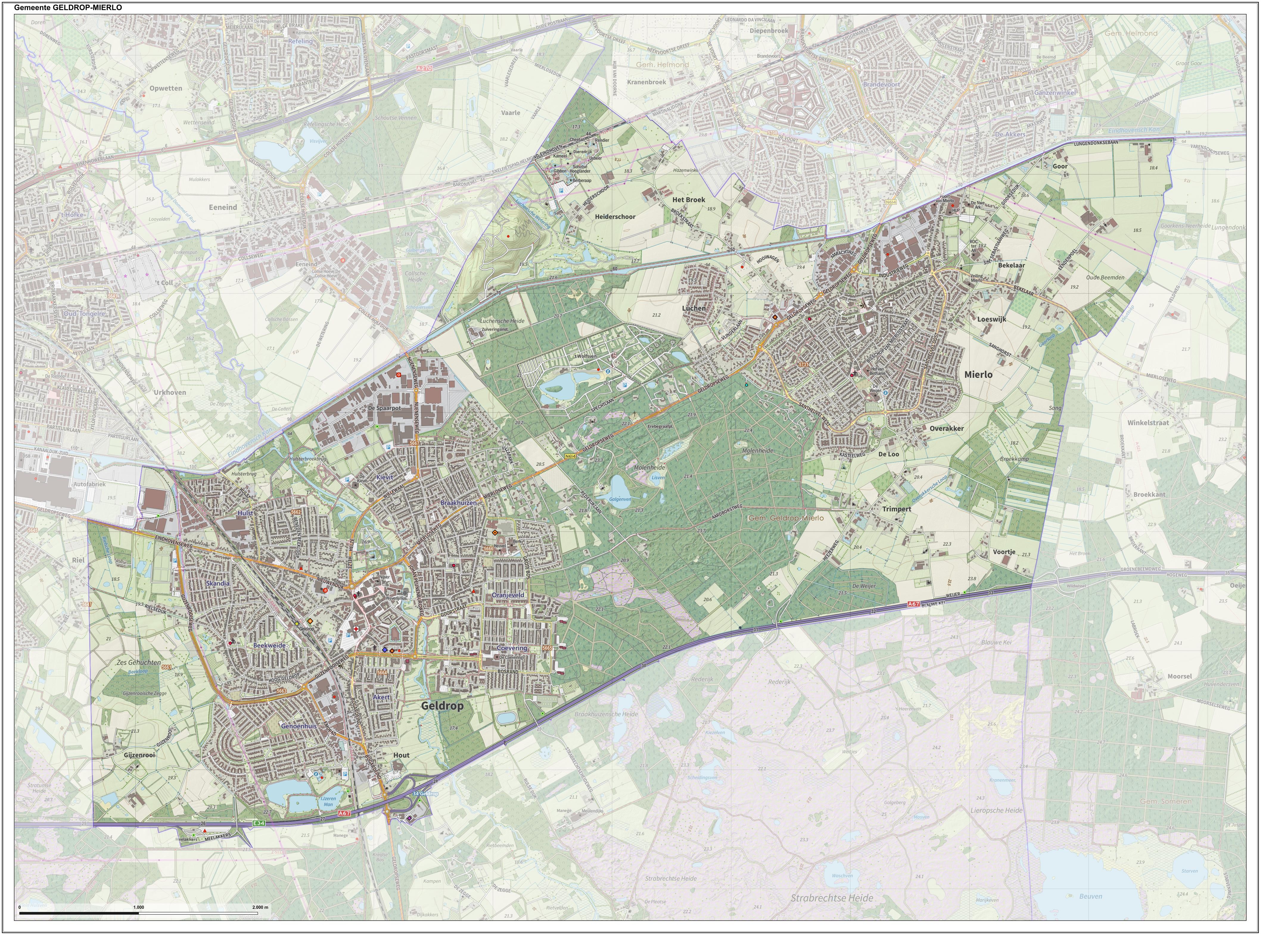 Topografische gemeentekaart. Resolutie: 400 pixels/km. Kaartbeeld samengesteld uit de open geodata van de Top10NL en Top25namen, Kadaster, Creative Commons BY licentie. Gebouwvlakken uit open geodata BAG extract. Wegen uit de OpenStreetMap, OpenStreetMap community. Schaduwreliëf uit de Actuele Hoogtekaart AHN2. Samenstelling en kleurenschema: Jan-Willem van Aalst, met QGIS2. Zie ook de Legenda.